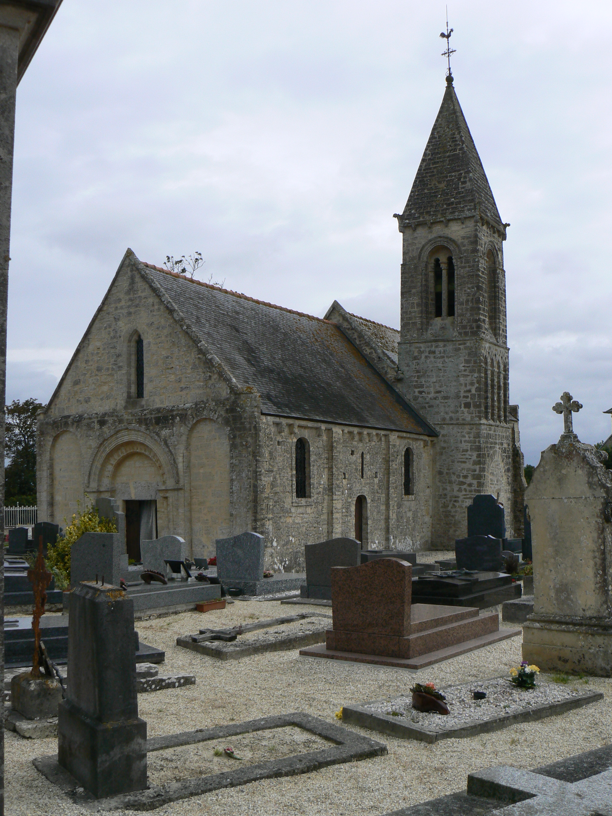 Église d'Huppain (14). .